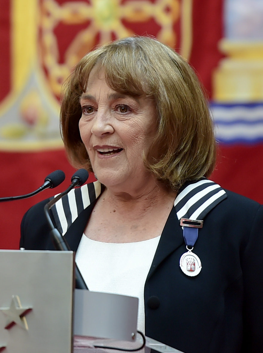 Entrega de la Medalla internacional de las Artes de la Comunidad de Madrid a Carmen Maura